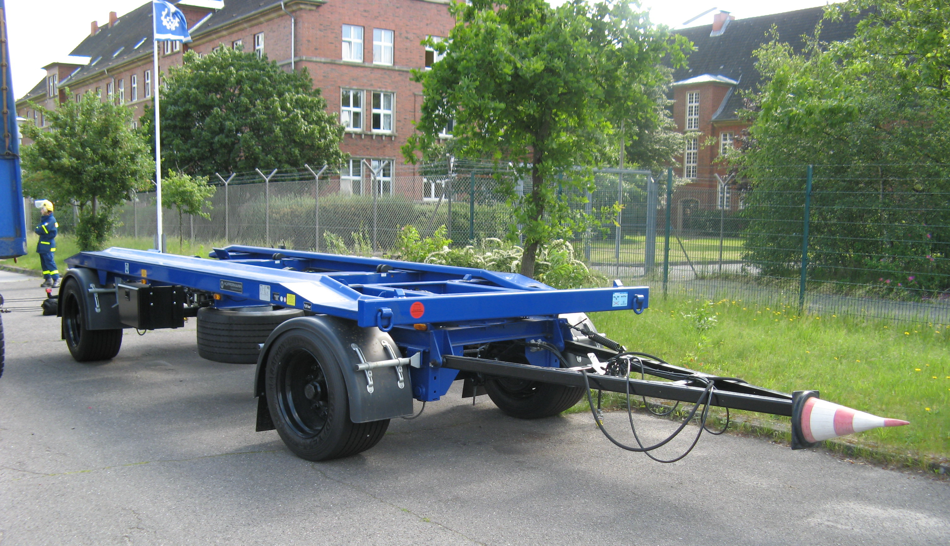 Anhänger für WLF